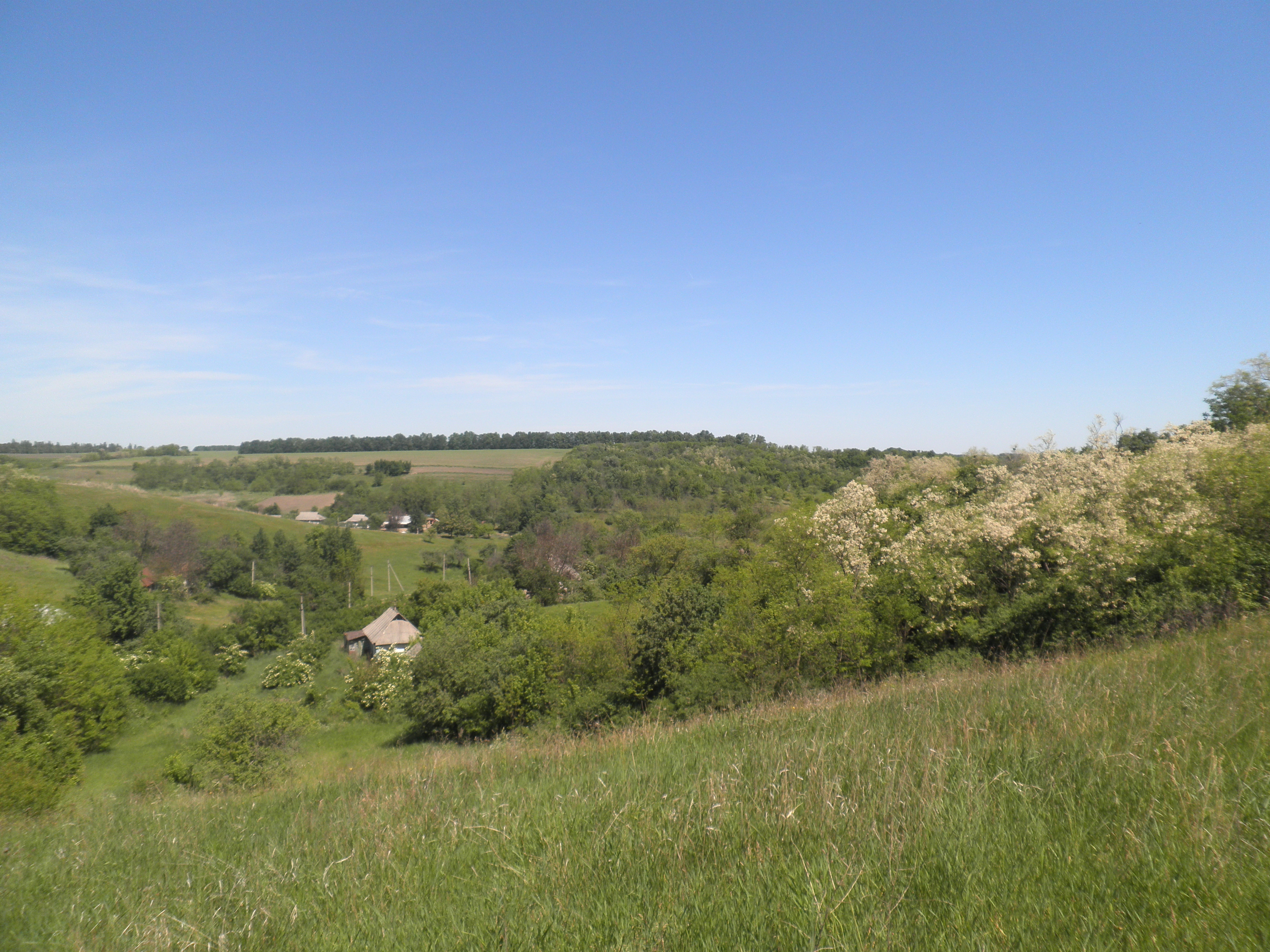 вид села